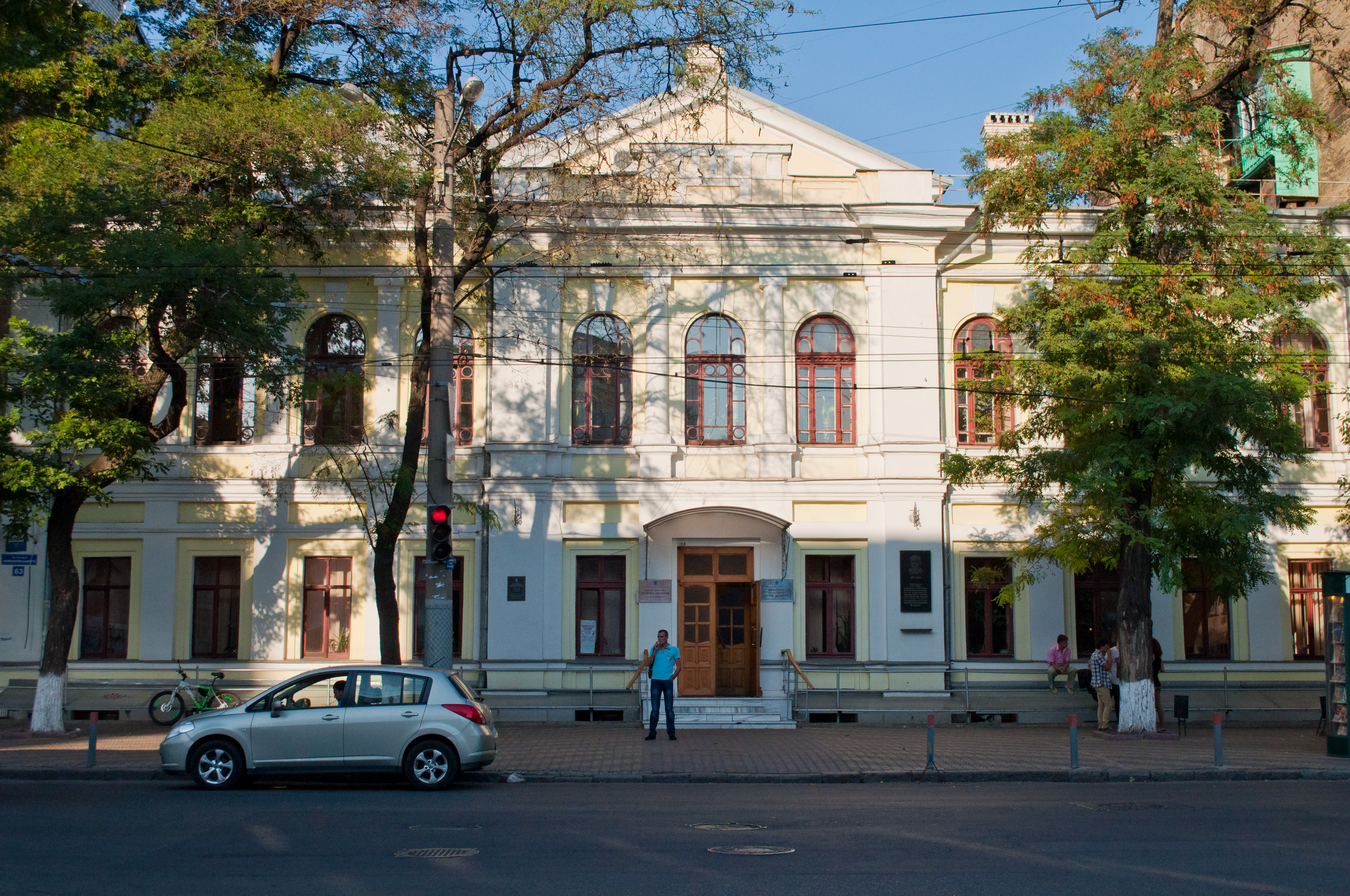 Будівля учбова Одеської консерваторії, першої на півдні України, відкритої у вересні 1913 р., в якій навчались і викладали діячи культури: П.С. Столярський, В.М. Малишевський, К.Ф. Данькевич, О.М. Благовидова, С. Орофєєв, В. Золотарьов, П. Молчанов, В. Ваулін, Е. Гілельс, К. Пирогов, А. Коган та Герой Радянського Союзу П. Вершигора та .інші.